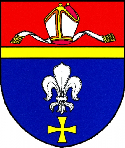 znak, Nížkov, okres Žďár nad Sázavou